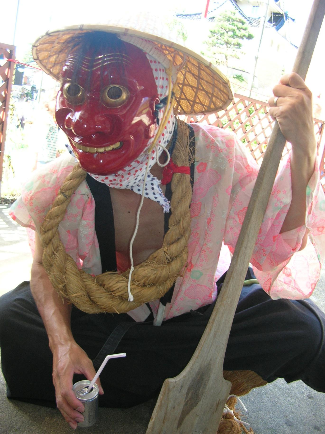 Bakumen of Hourai Festival (ほうらい祭りの獏面)in Hakusan City, Ishikawa, Japan